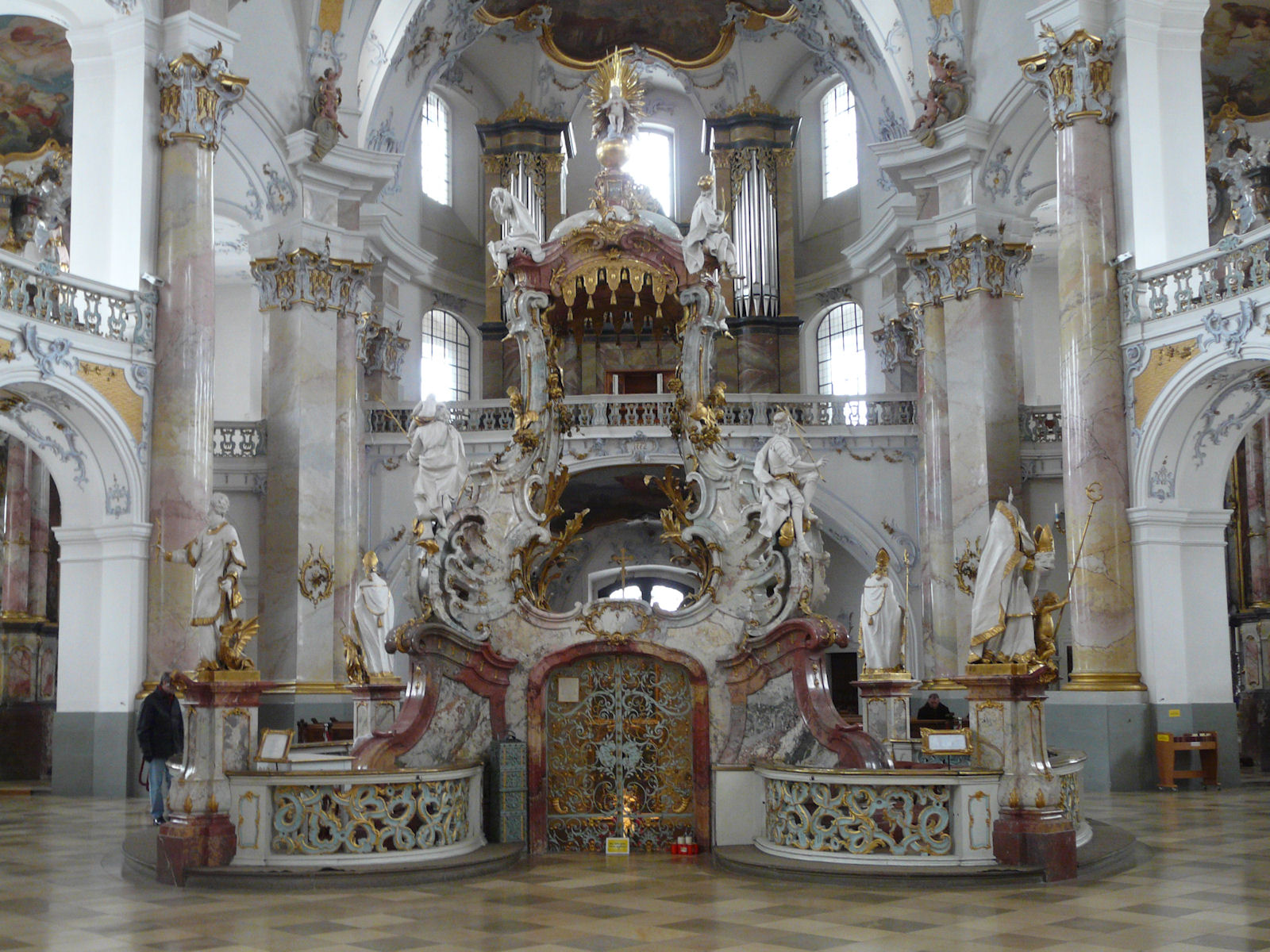 Gnadenaltar. Die Basilika Vierzehnheiligen bei Bad Staffelstein im Landkreis Lichtenfels ist eine Wallfahrtskirchen in Oberfranken.Another view of the Altar of the Vierzehnheiligen represented by the fourteen holy helpers. Basilica of the Fourteen Holy Helpers, Bad Staffelstein near Bamberg, in Bavaria, Germany